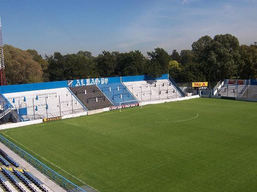 Popu del estadio